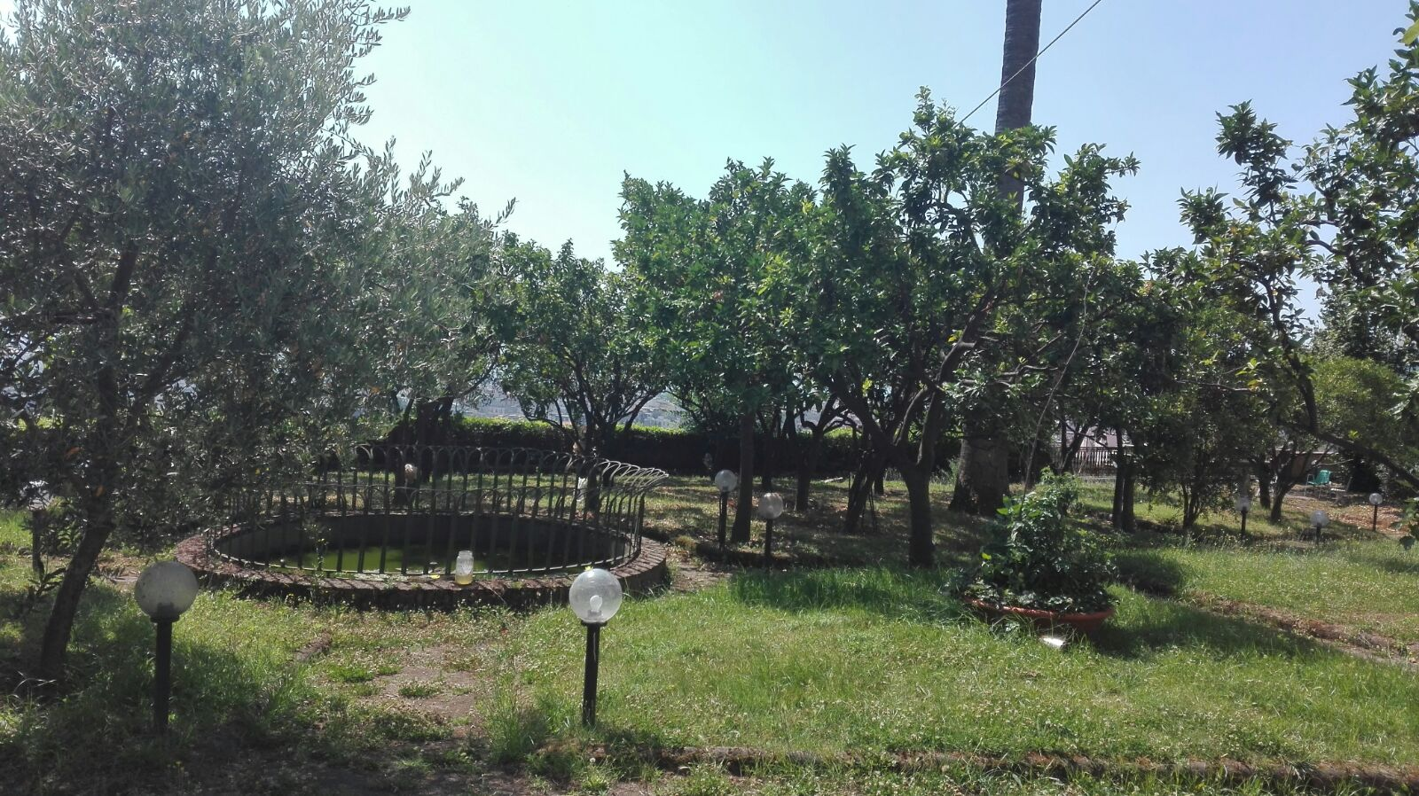 Il giardino di villa Serra, lato sud.